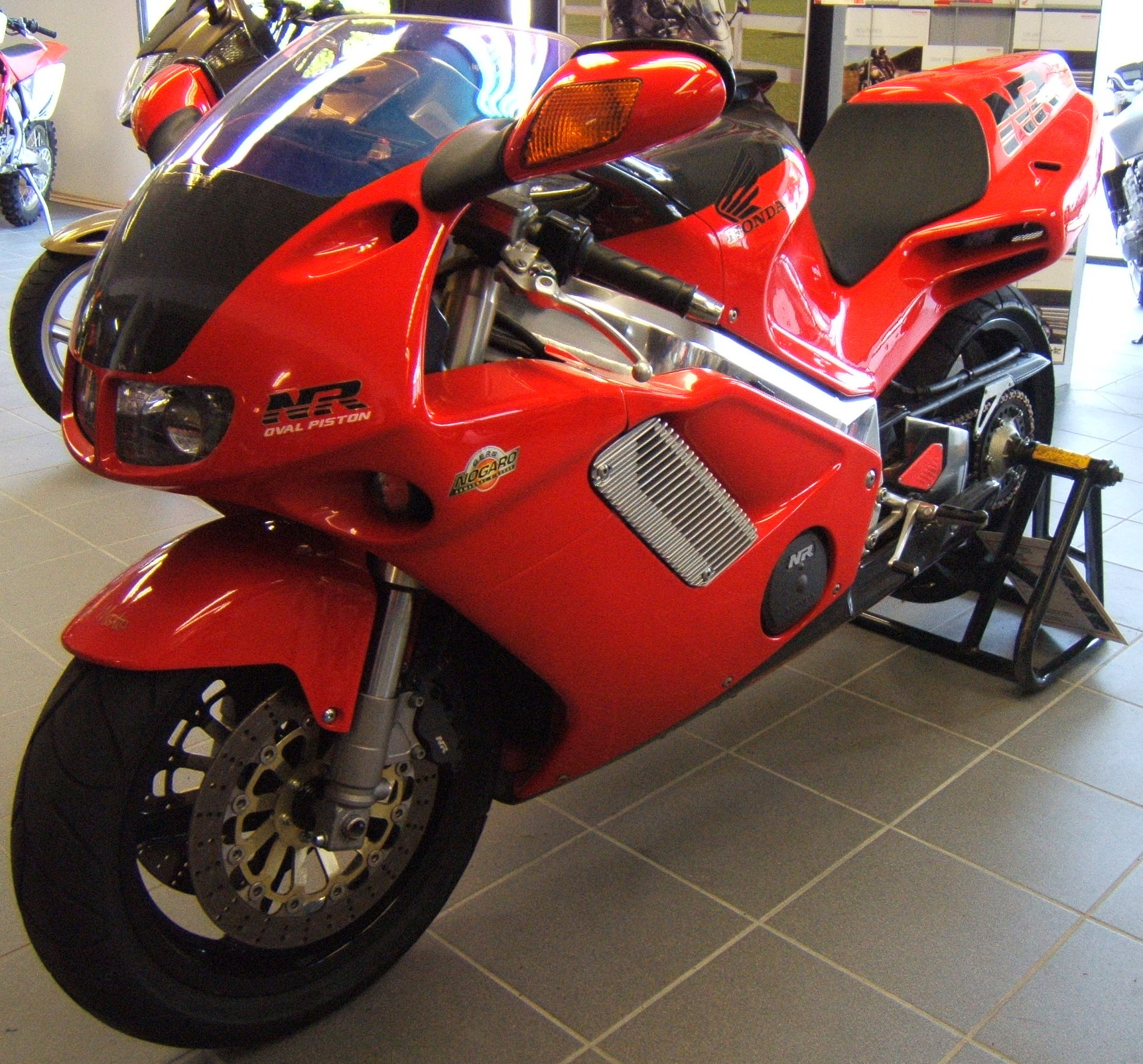 Moto Honda 750 NR